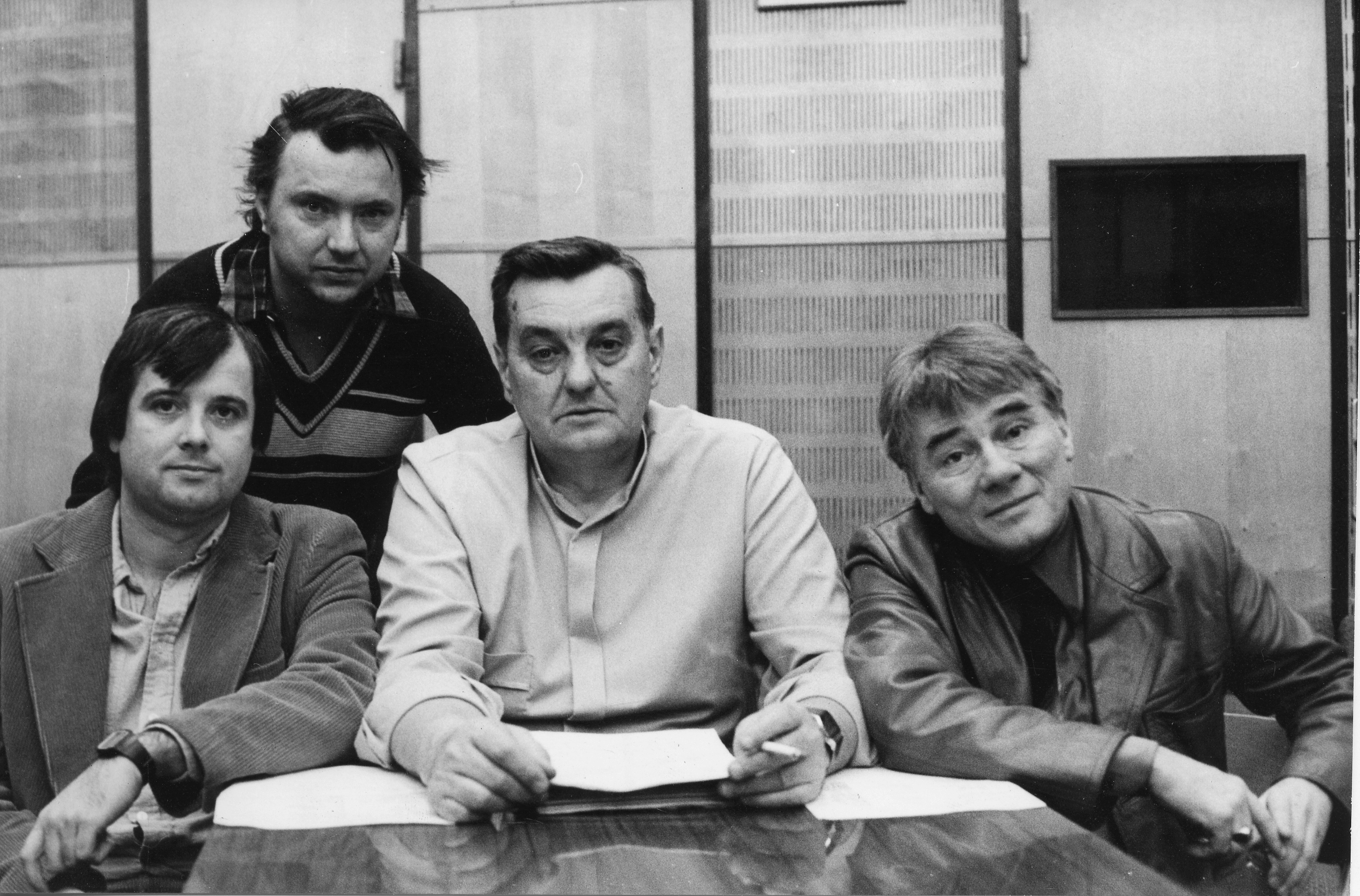 Magyar Rádió. Sinkó Péter, Farkasházy Tivadar, Marton Frigyes, Kaposy Miklós a Rádiókabaré szerkesztői. Location: Hungary, Budapest VIII. Tags: Budapest, Hungarian Radio Title: Magyar Rádió. Sinkó Péter, Farkasházy Tivadar, Marton Frigyes, Kaposy Miklós a Rádiókabaré szerkesztői.